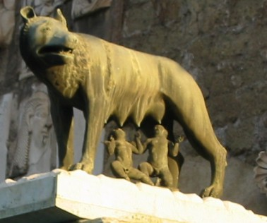 Lupa capitolina a Porta Ovile, a Siena.